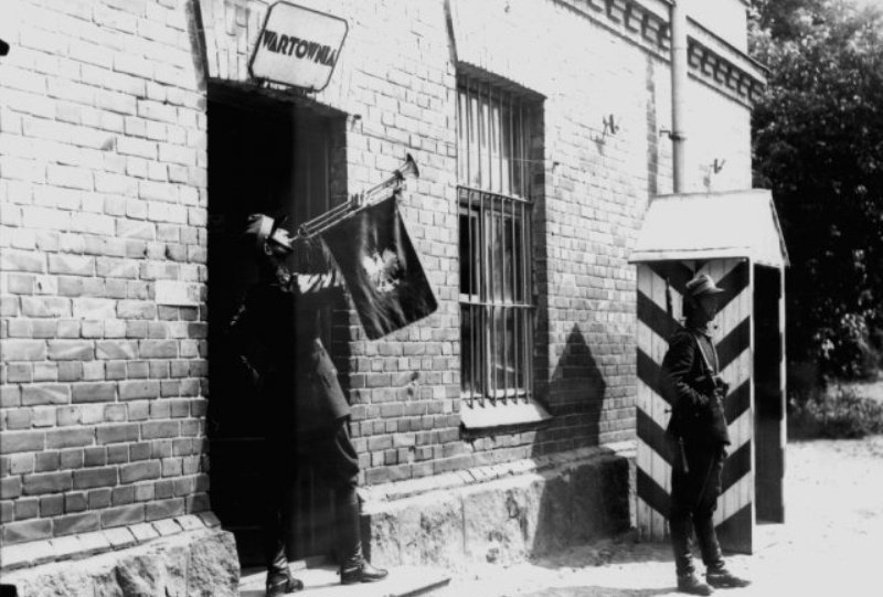 Garnizon Przasnysz, 1921r. Pobudka fanfarzysty i wartownik z 3 szwadronu 7 Pułku Ułanów Lubelskich